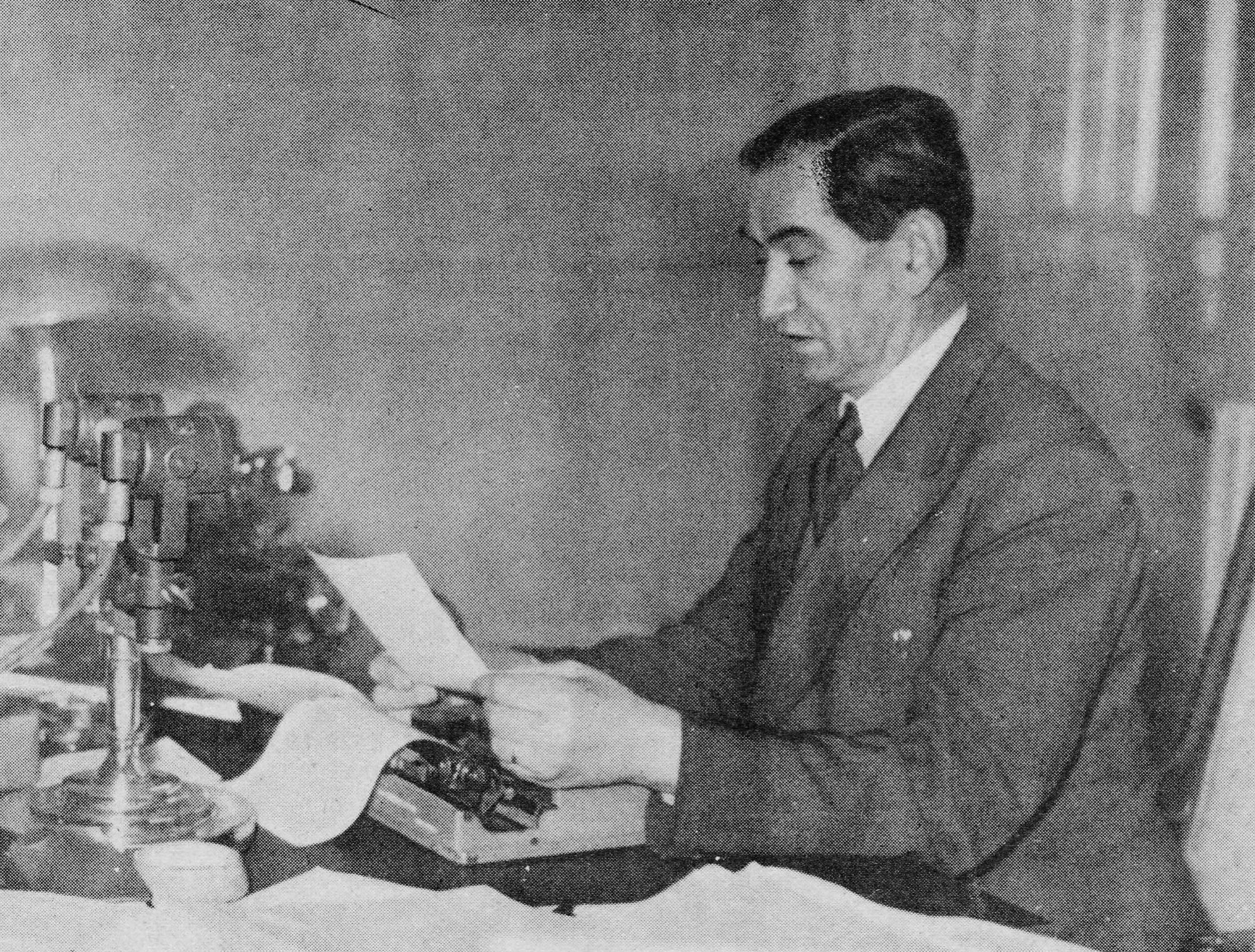 Photographie de Philippe Henriot par Louis Silvestre.